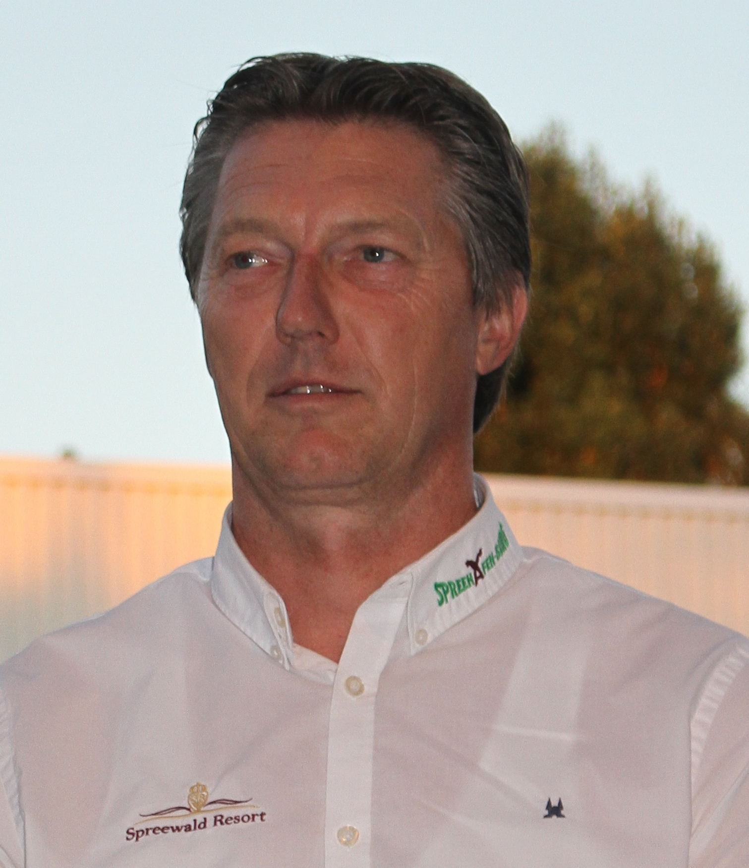 Dirk Meier, deutscher Radsportler